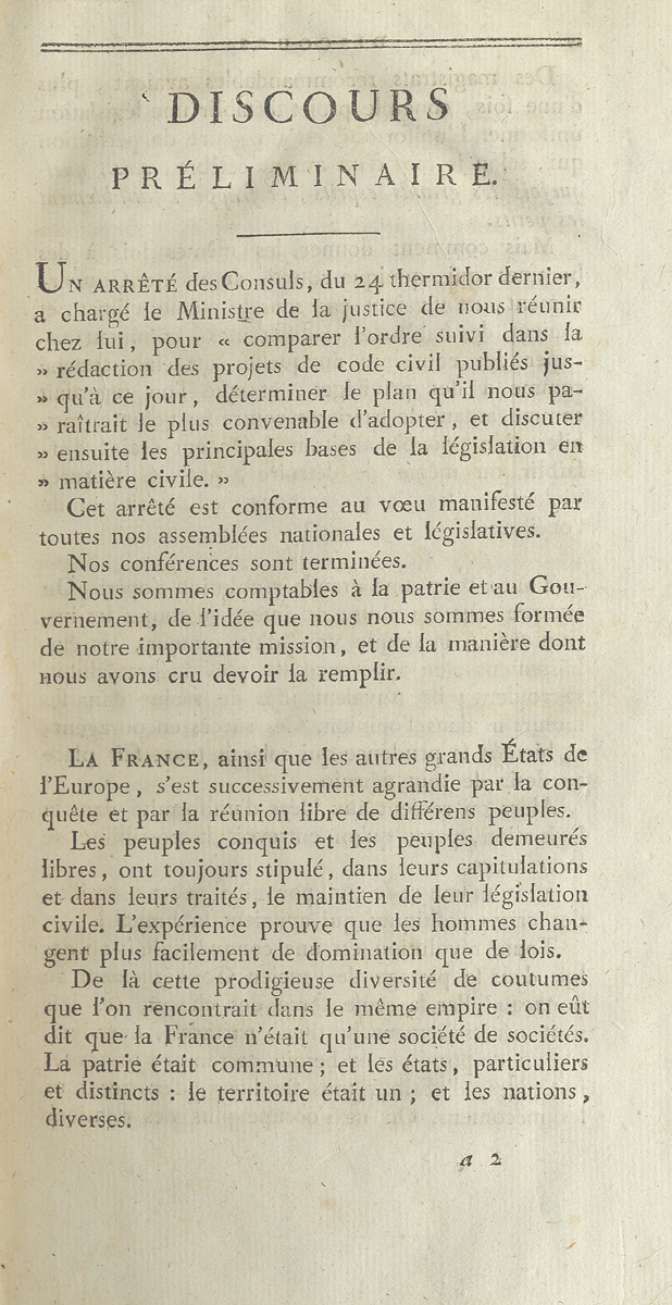 Discours préliminaire